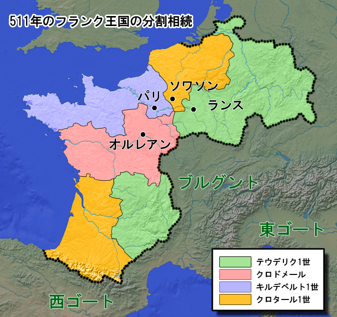 511年のフランク王国の分割相続。